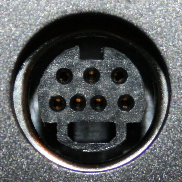 A 7-pin mini-DIN connector